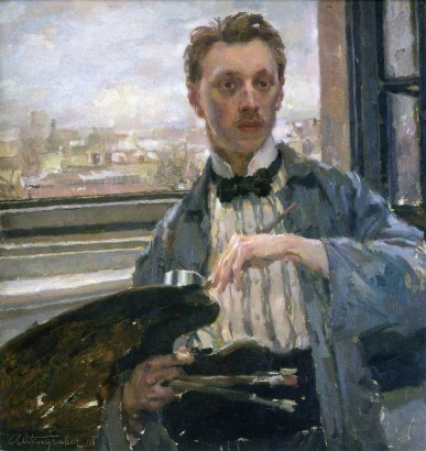 Self-portrait